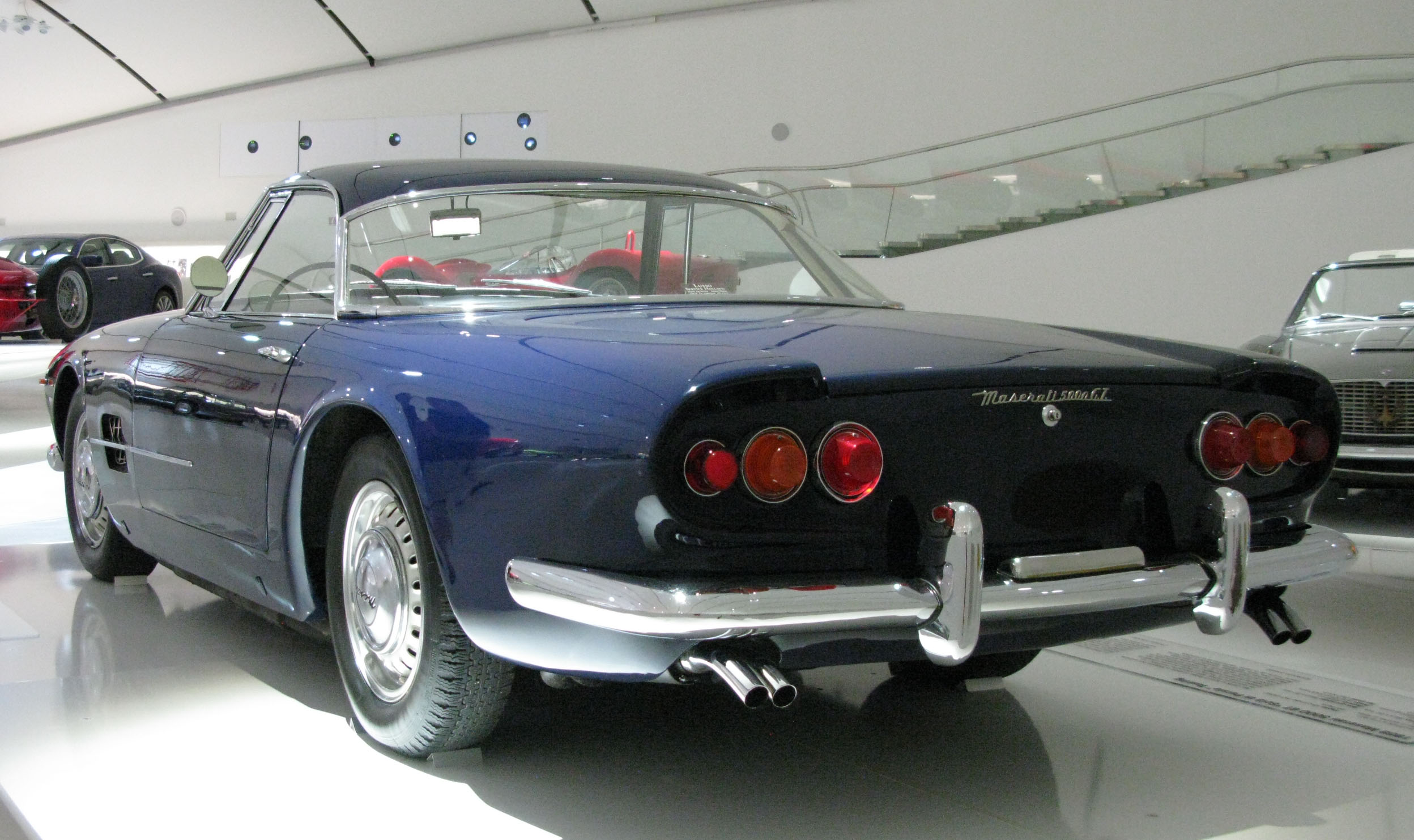 Maserati 5000 GT "Scia di Persia".